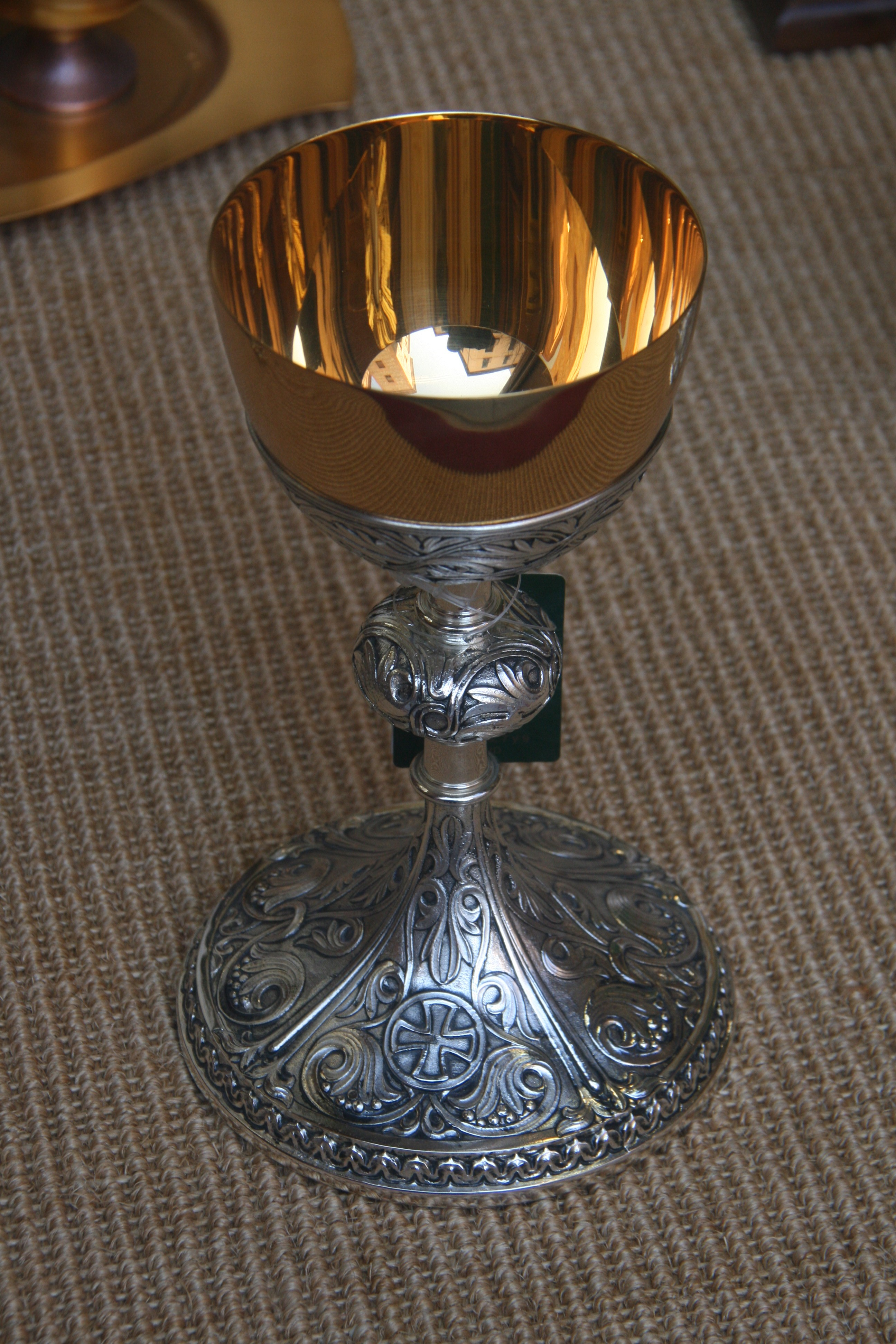 Cáliz